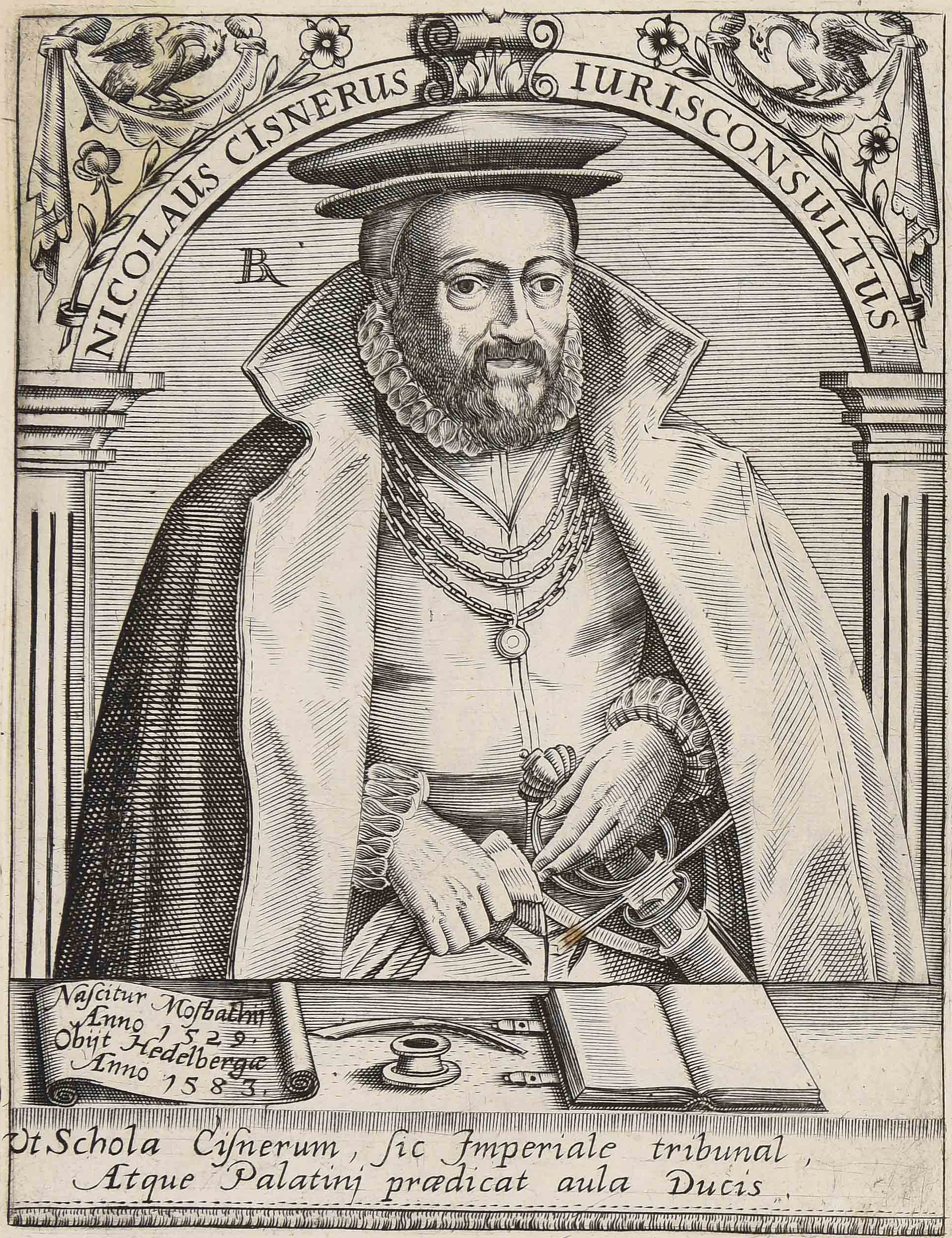 Calcografia in Jean Jacques Boissard, Bibliotheca sive Thesaurus virtutis, Frankfurt am Mein: William Fitzer 1627. Esemplare GI 1 v. c 41 della Biblioteca comunale di Trento, che presenta aggiunte successive.